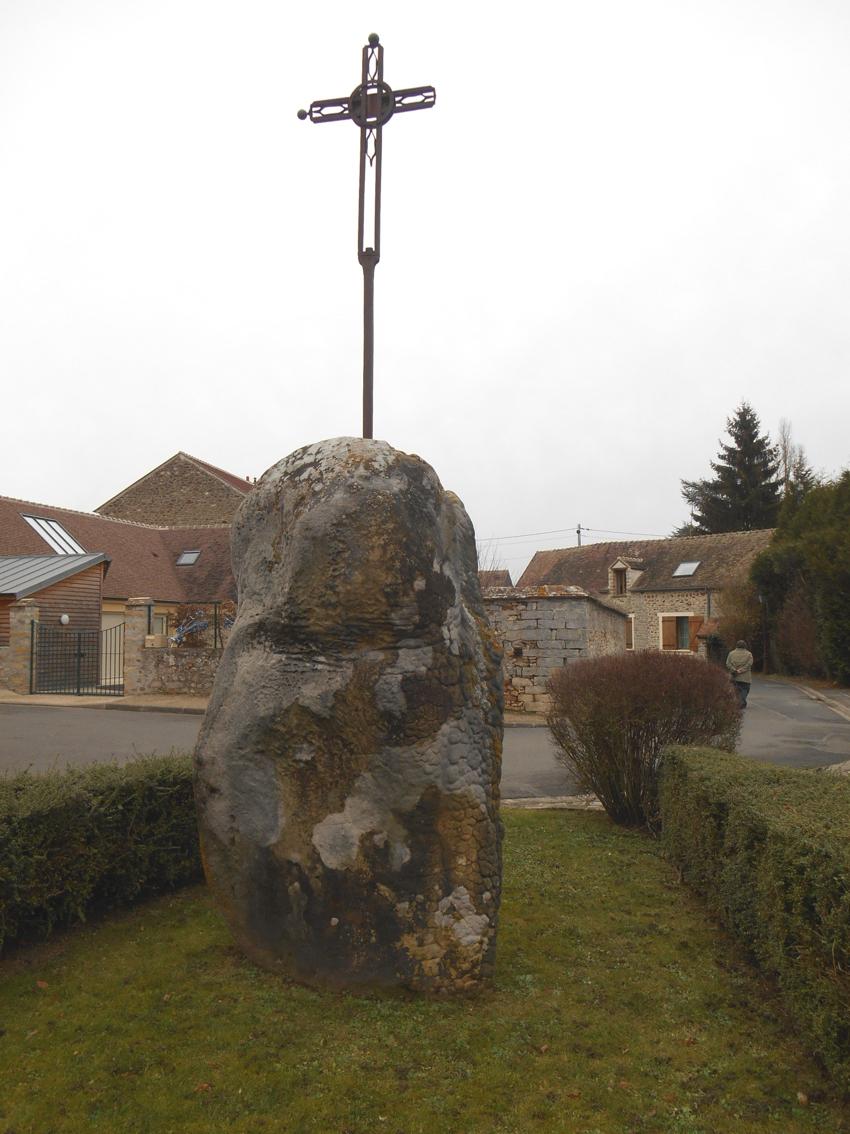 Pseudo-menhir, Saint-Martin-en-Bière (77)